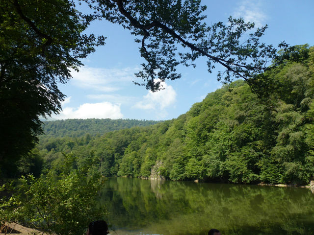 Պարզ լիճը